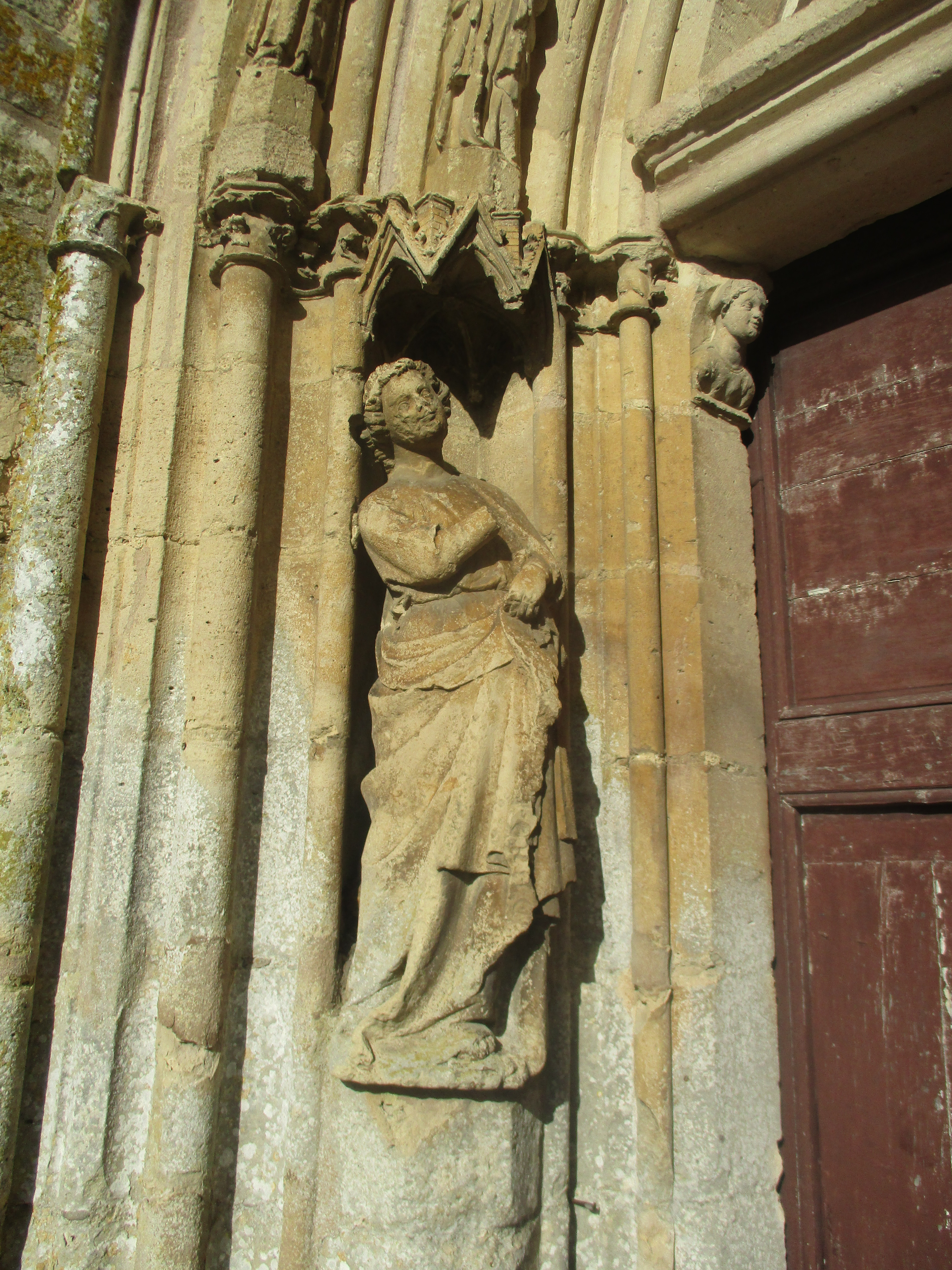 Statue du portail de l'église de Dixmont.